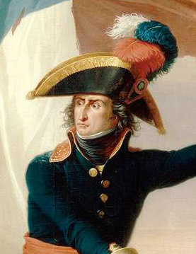 Augereau au pont d’Arcole, 15 novembre 1796